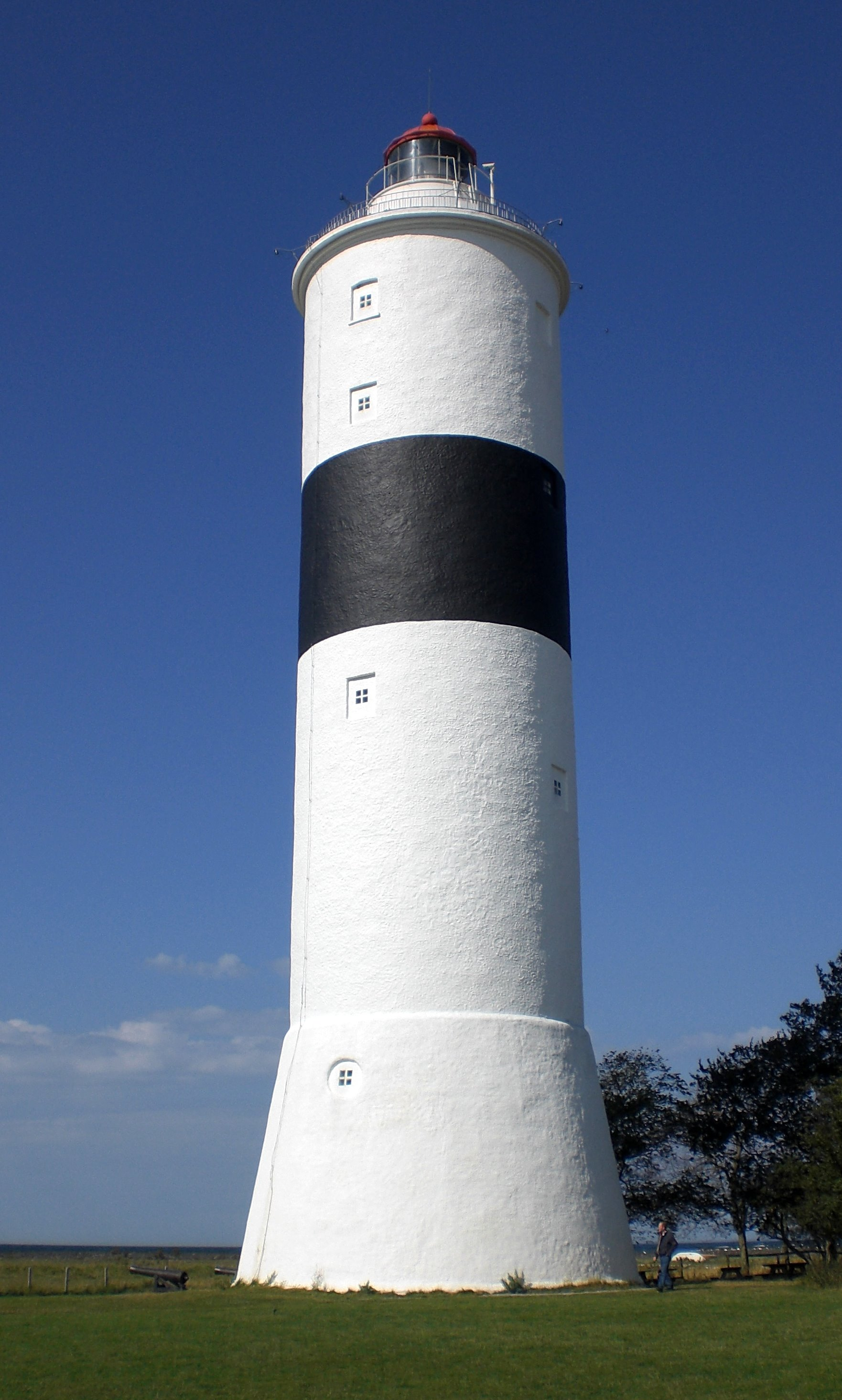 Leuchtturm Langer Jan auf der Südspitze der schwedischen Insel Öland